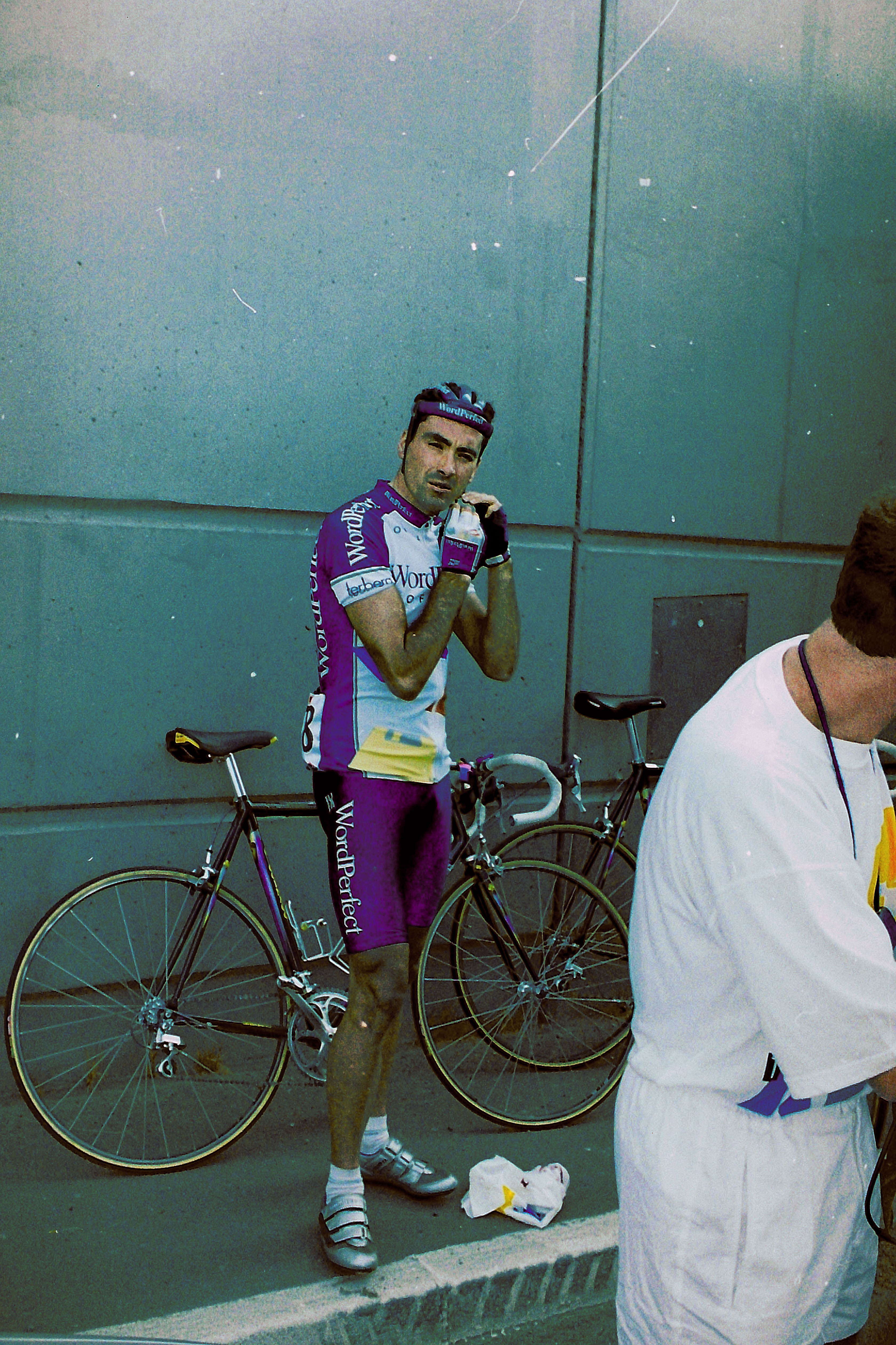 1994 prologue du tour de france a lille